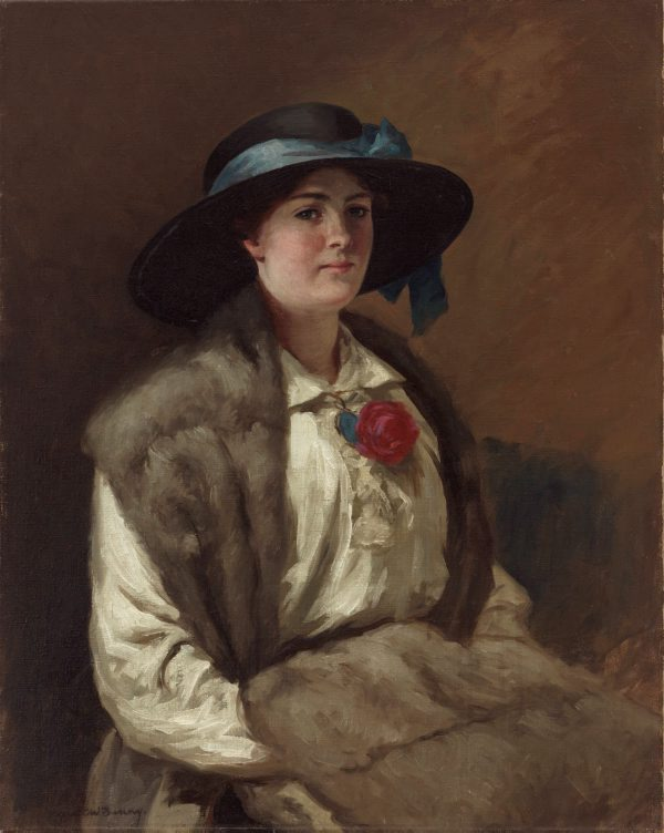 Miss Hilary Mackinnon